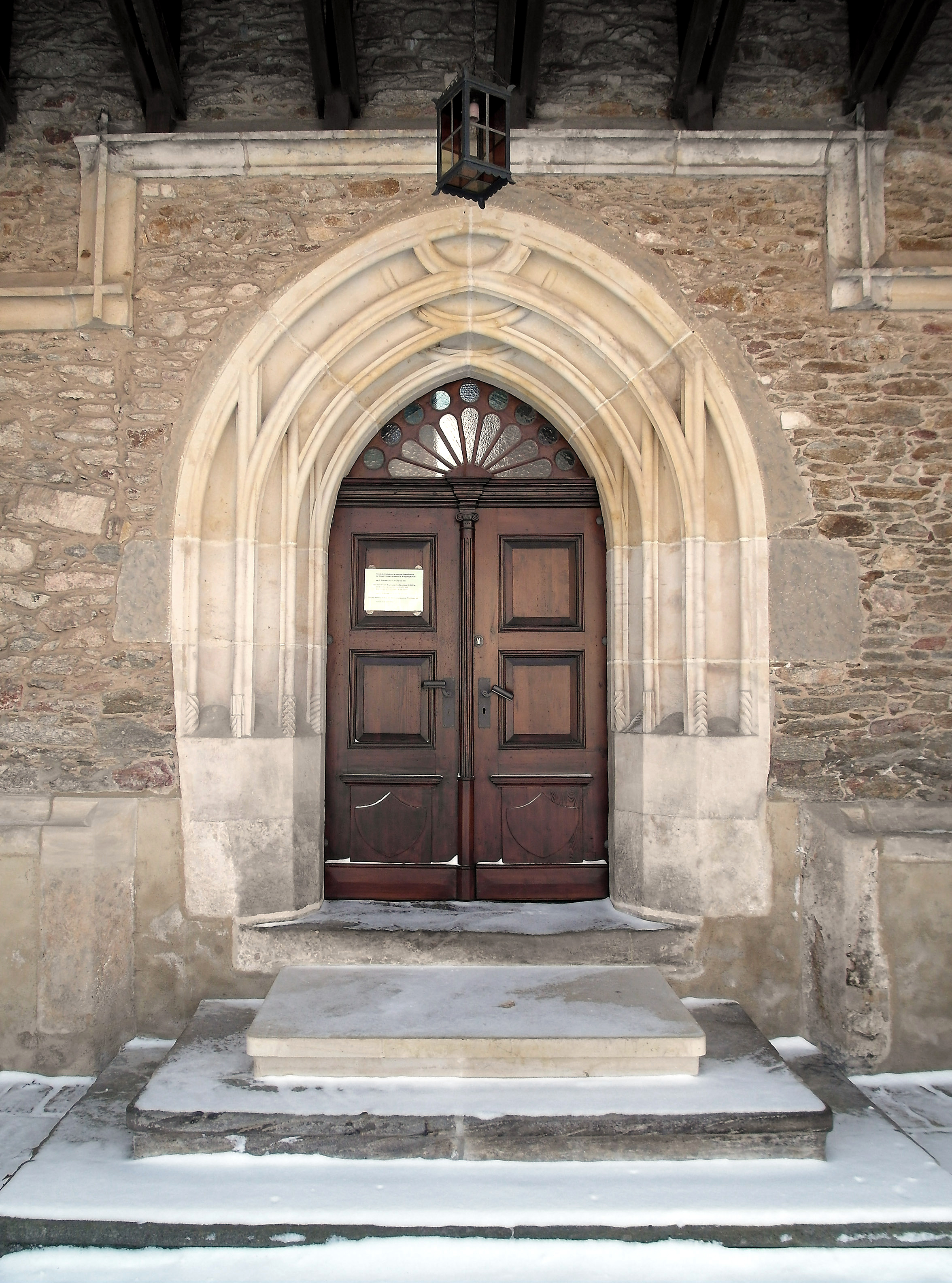 14.03.2013 01768 Glashütte, Markt: St. Wolfgangskirche (GMP: 50.852196,13.776420). Die spätgotische Hallenkirche wurde in der Zeit von 1521 bis 1535 erbaut. Nordportal. [SAM5646.JPG]20130314505DR.JPG(c)Blobelt